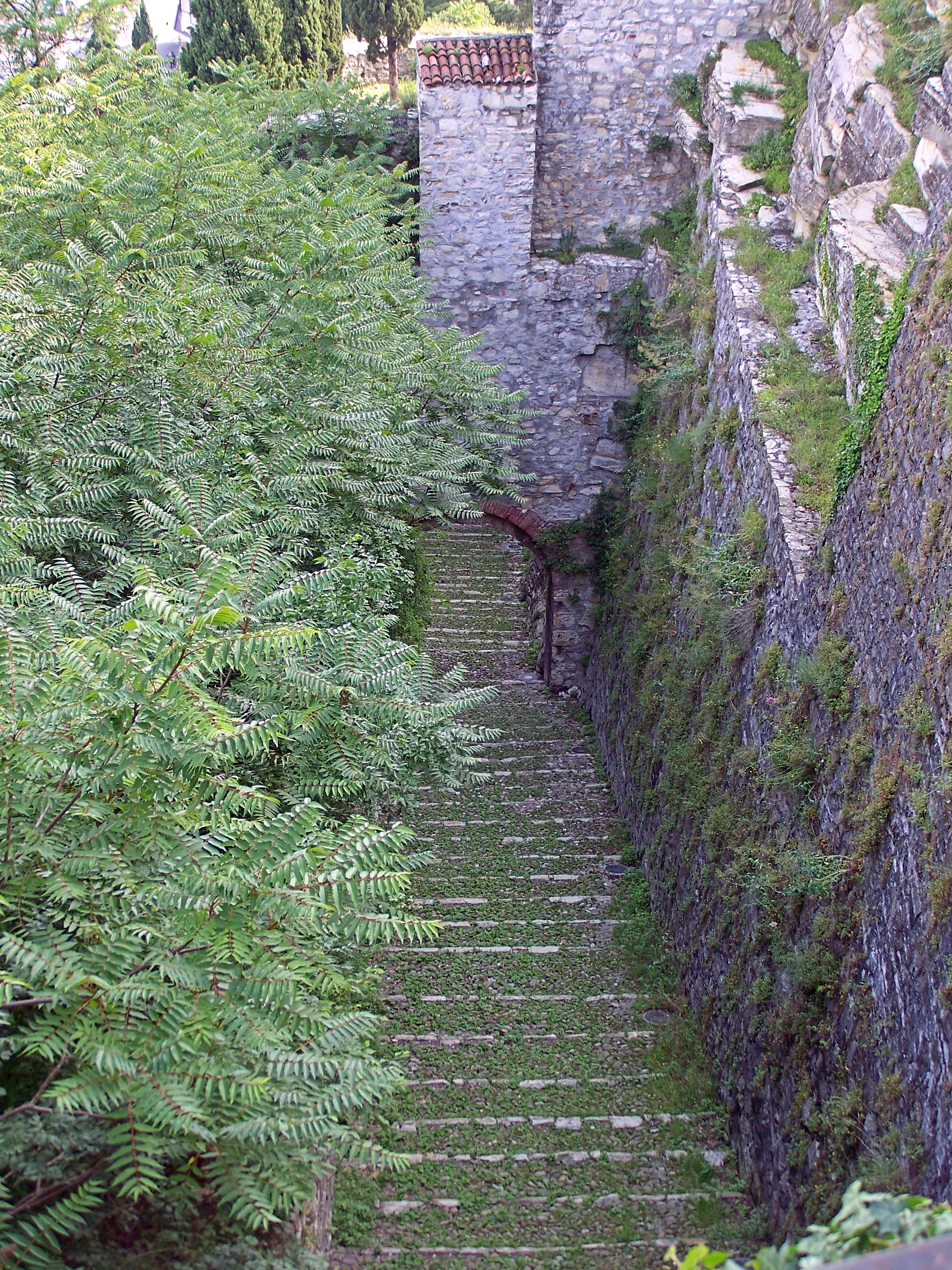 La strada del soccorso del Castello di Brescia vista dall'alto